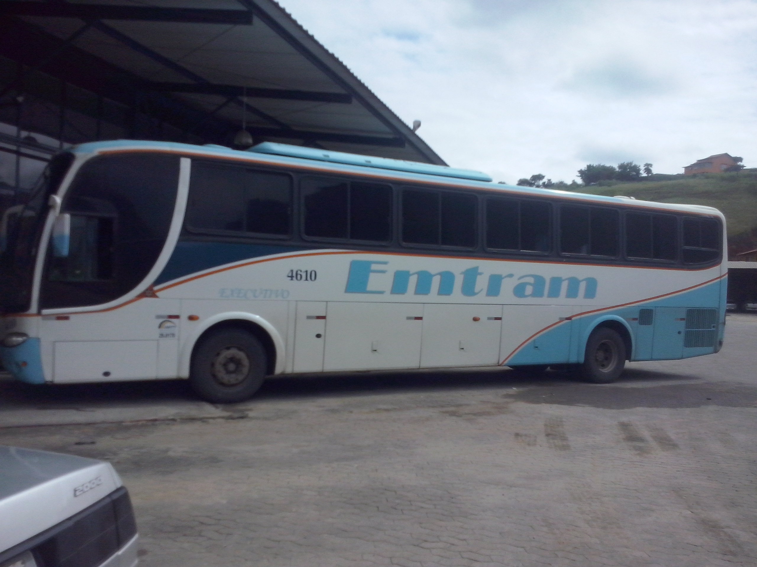 Ônibus da Emtram estacionado em um restaurante da cidade de Paraíba do Sul, Rio de Janeiro.